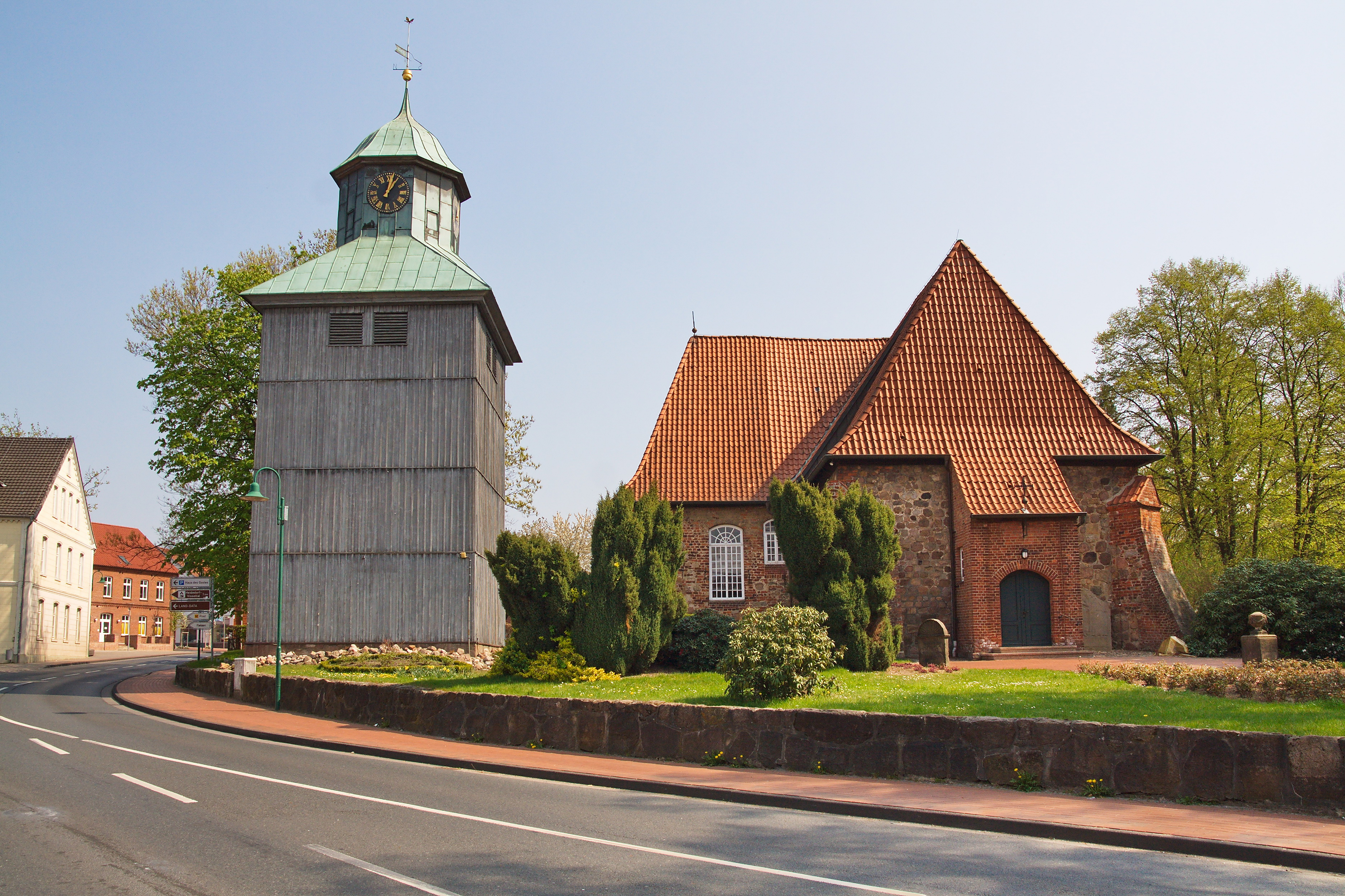 St. Johannis-Kirche in Visselhövede, Niedersachsen, Deutschland